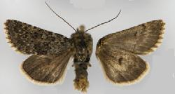 Lasionycta coracina male